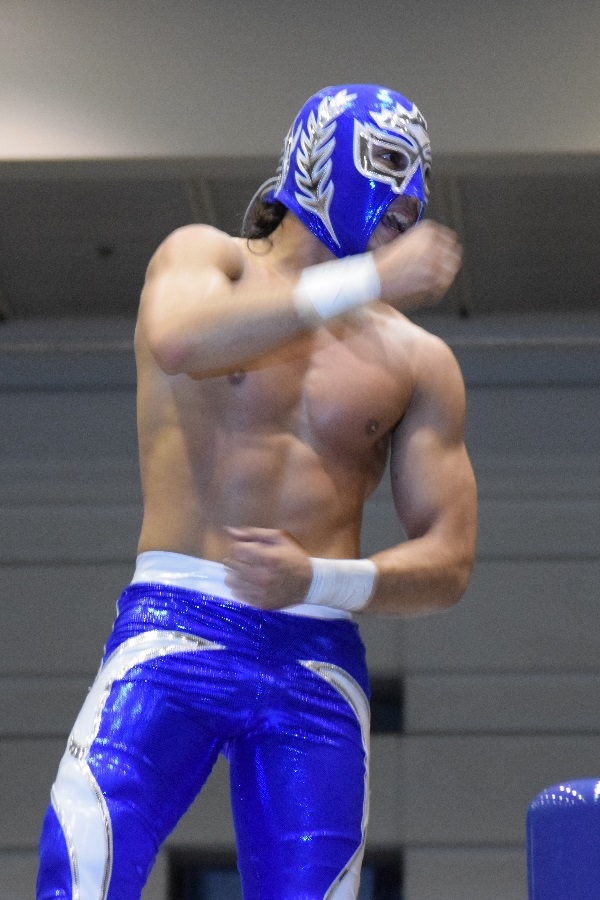 2017年1月13日 大阪府立体育会館・第二競技場「CMLL FANTASTICA MANIA 2017」 ソベラーノ・ジュニア